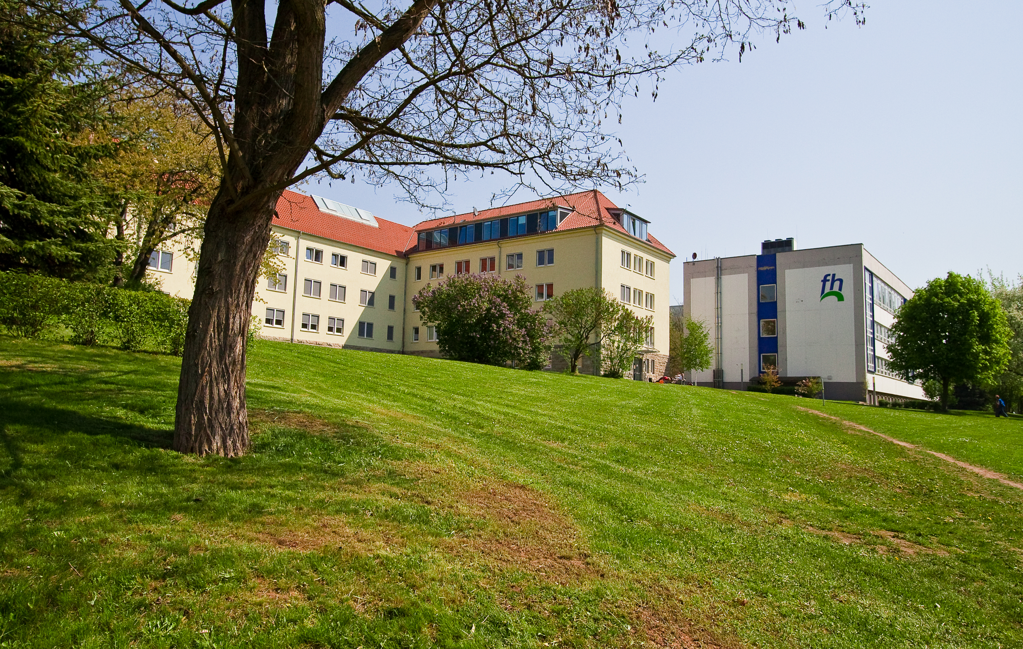 Die Gebäude 18 und 19 der FH Nordhausen, Blick vom Haus 25